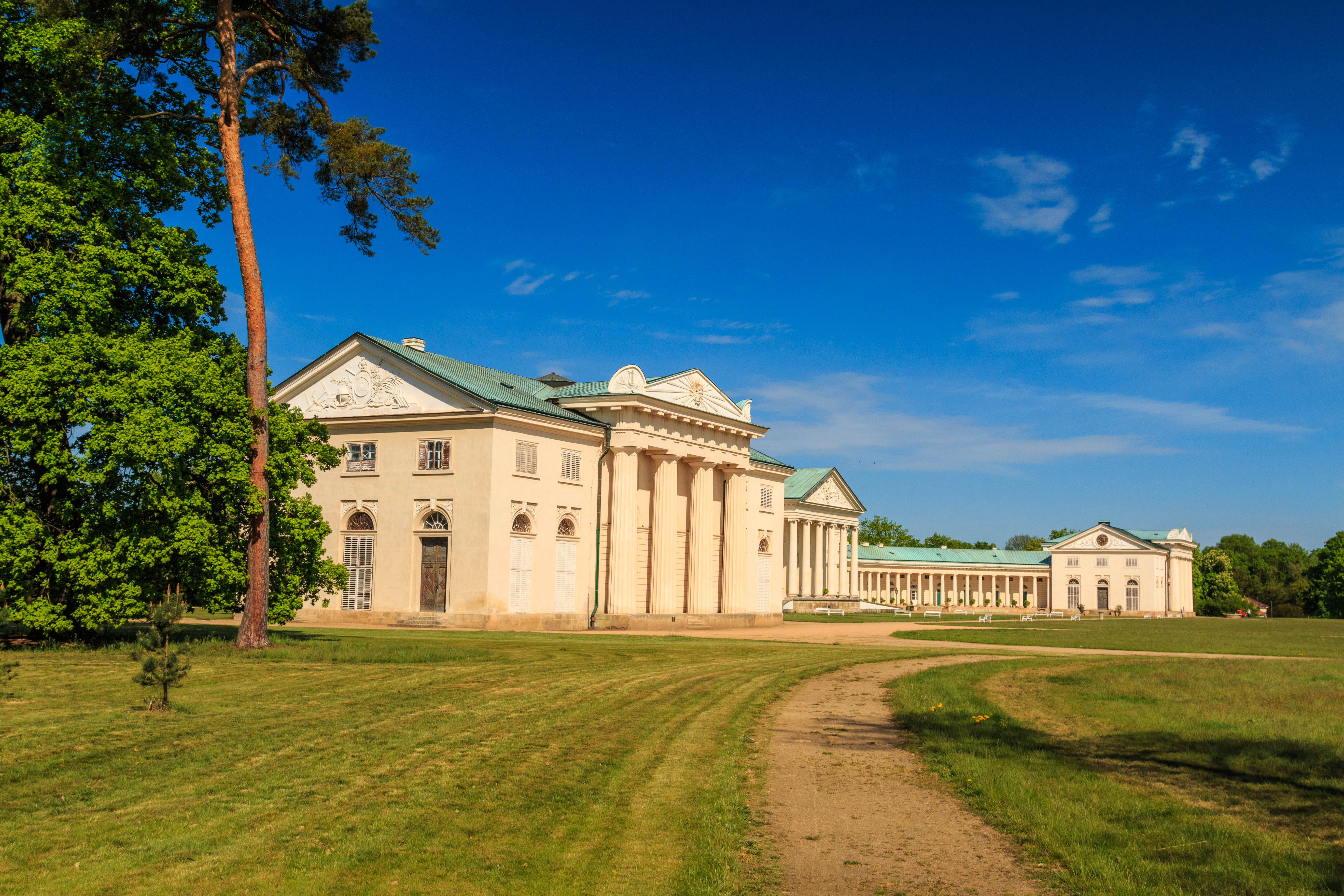 Zámek Kačina, Svatý Mikuláš 51, Svatý Mikuláš (okres Kutná Hora).